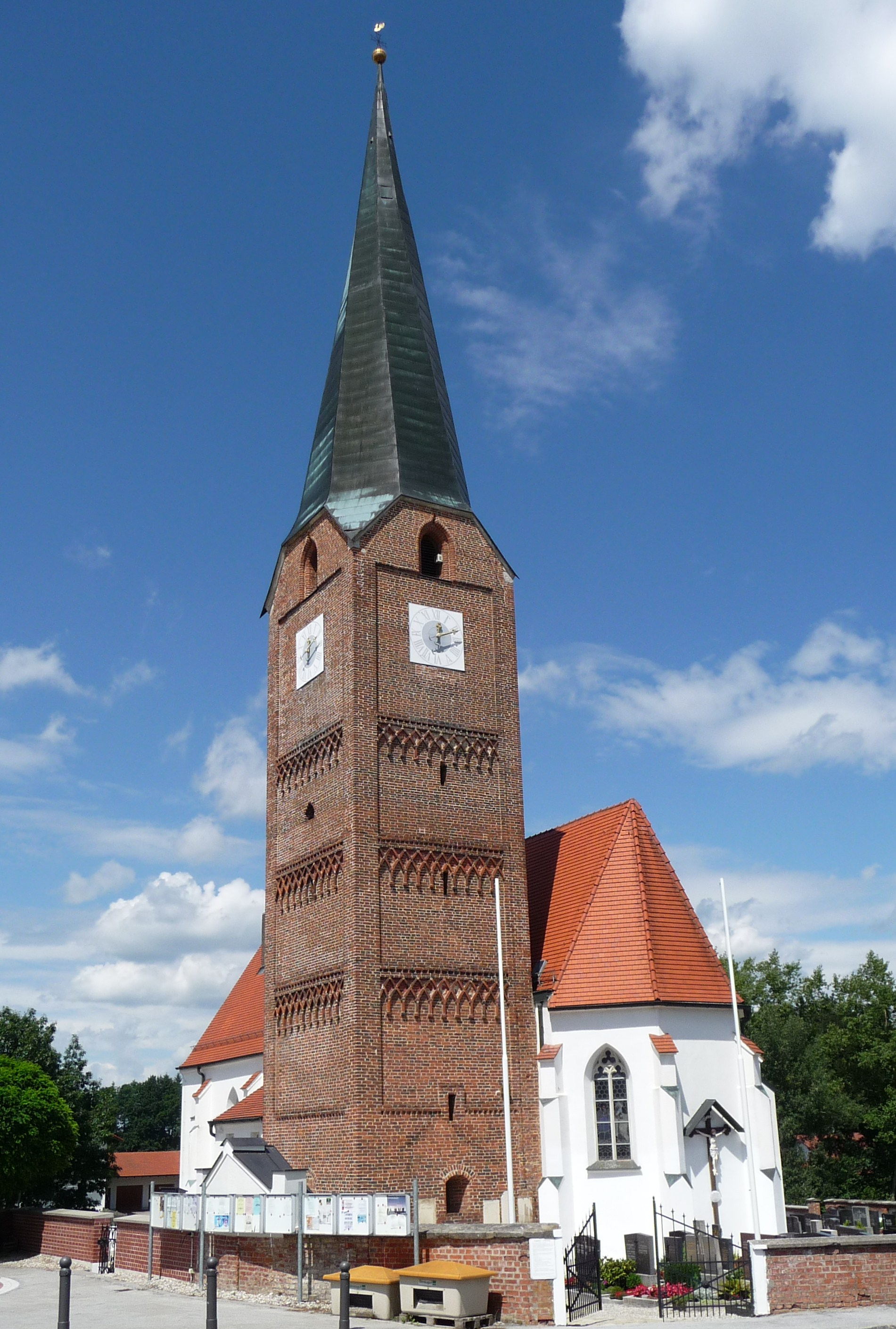 Die Pfarrkirche St. Maria, St. Philippus und Jakobus in Wittibreut